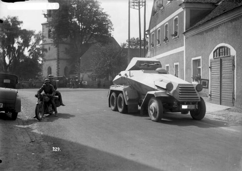 Herbstmanöver des IX. Armeekorps in der Bayrischen Ostmark 1935, Panzer-Spähwagen im Dorf Mantel